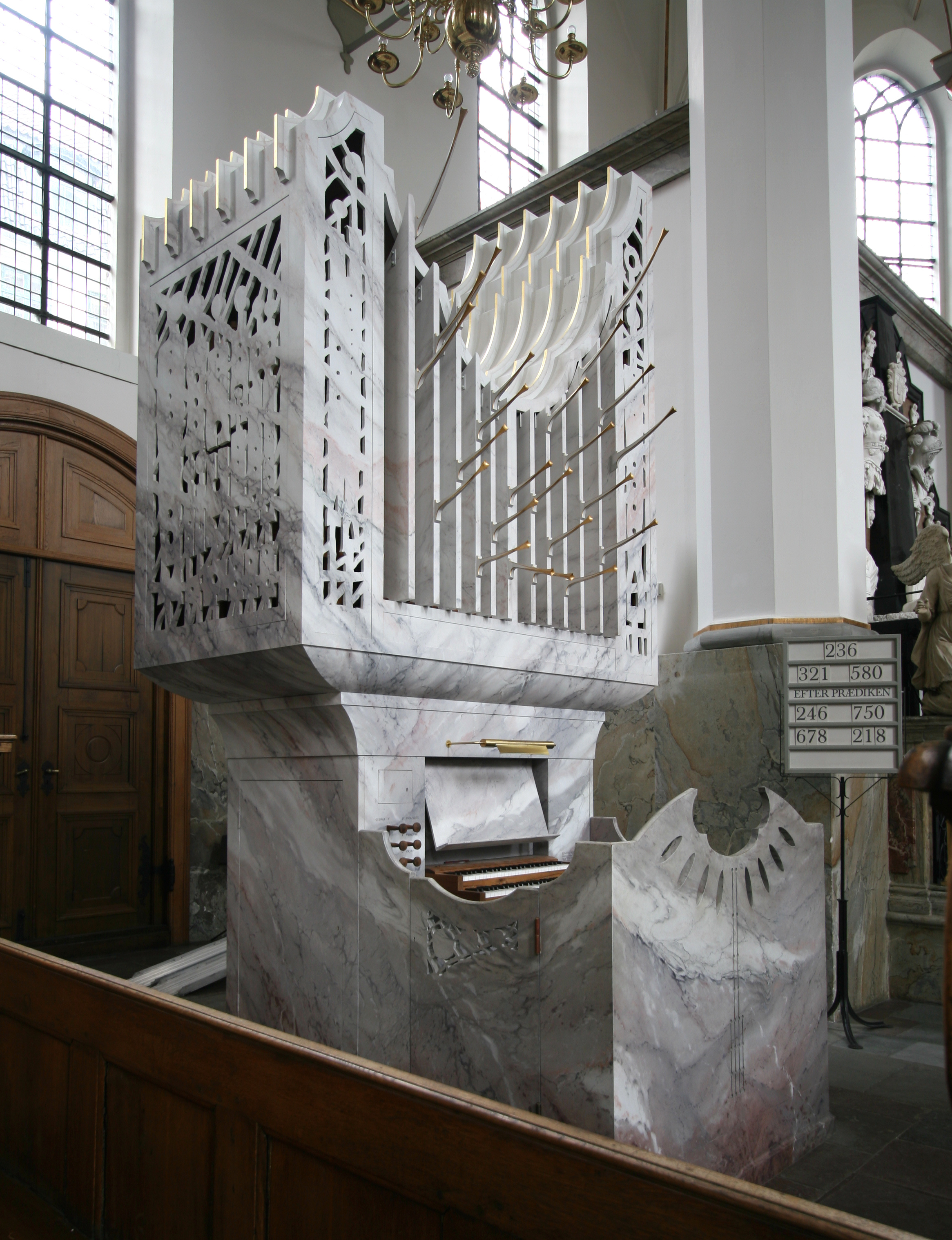 Trinitatis Kirke, Copenhagen, Denmark. Kororgel.